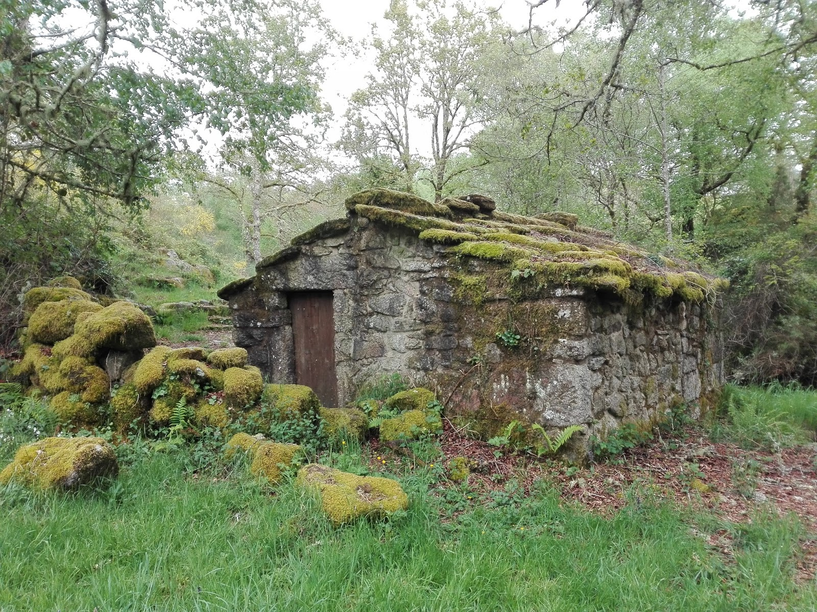 A su lado se encuentra también un puente romano.